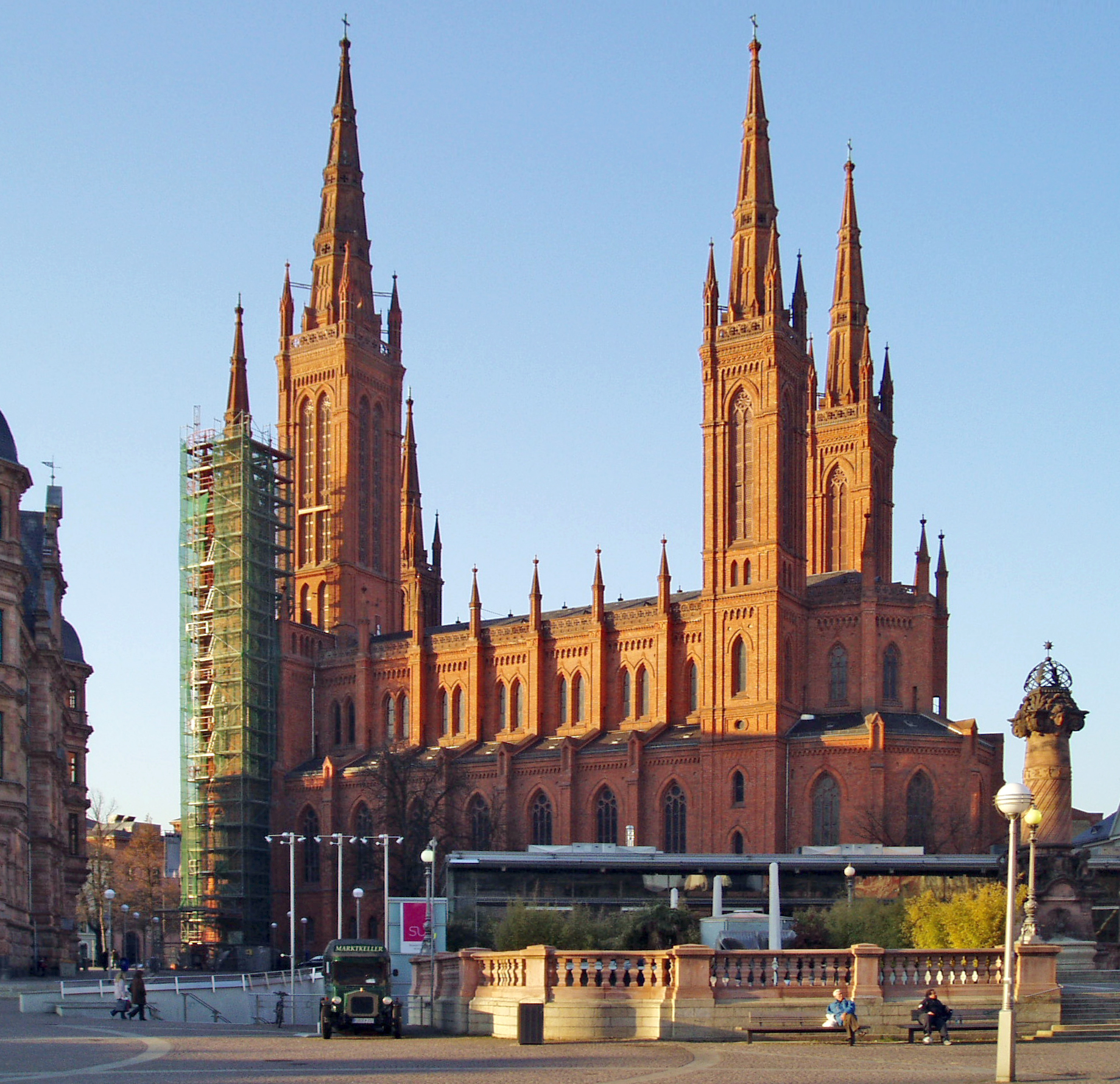 Das Bild zeigt die neugotische Marktkirche (Wiesbaden) in Wiesbaden mit ihren fünf Türmen. Es wurde aufgenommen vom Dernschen Gelände aus. Rechts im Vordergrund das Neue Rathaus, links die Marktsäule. Jenseits des Neuen Rathauses befindet sich der Schloßplatz (Wiesbaden). Quelle: selbst fotografiert von Querido am 23.03.2006 Querido Datum: 25.03.2006